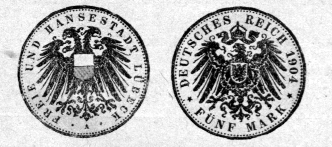 In jener Woche wurden von der Lübecker Stadtkasse neue Fünfmarkstücke mit dem Hoheitszeichen Lübecks, einem neue entworfenem Lübeckischen Adler, ausgegeben. Dieser vermied die viel angegriffene Form des schornsteinartigen Halsaufsatzes, auch die Flügel zeigten eine gefälligere, sich weniger dem Kreisrund anpassende Form. Die früher geprägten 10- und 2-Markstücke wurden Anfang Mai 1901, genau 100 Jahre nach der im Jahr 1801 erfolgten letzten Prägung Lübecker Geldes, ausgegeben.